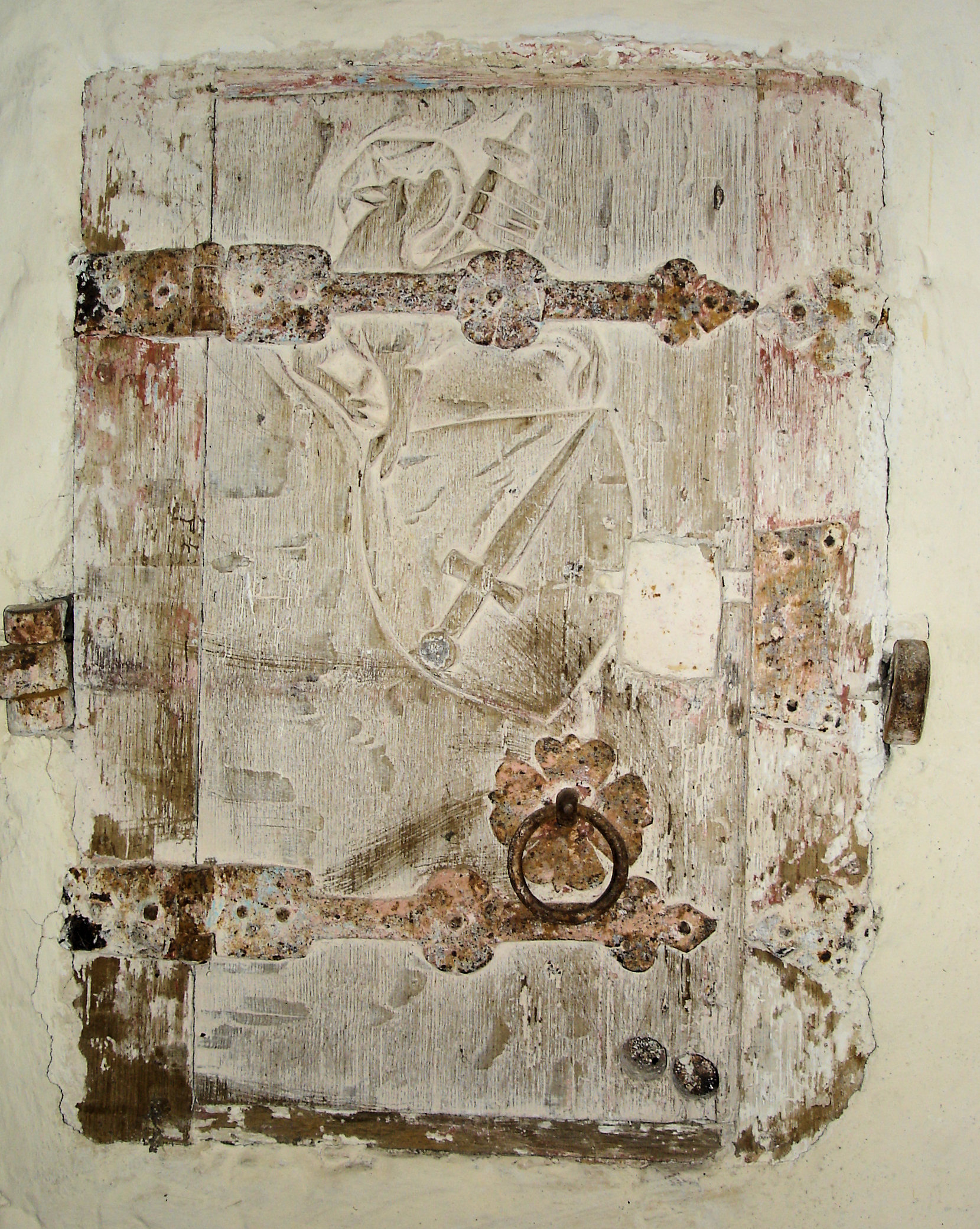 Kirche Lambrechtshagen, Sakramentsschrank / Church in Lambrechtshagen, wallclosed for sacraments